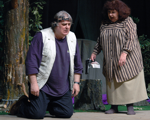 Zdjecie ze spektaklu "Płeć Przeciwna" Marka Rębacza